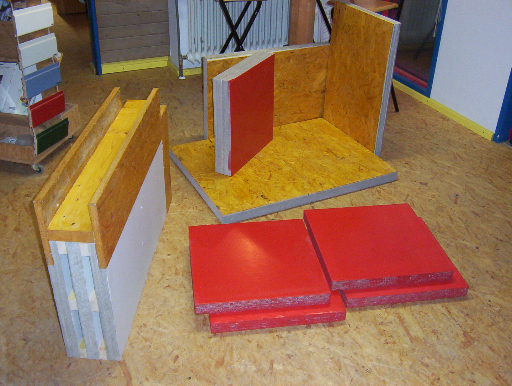 Anwendungsbeispiele